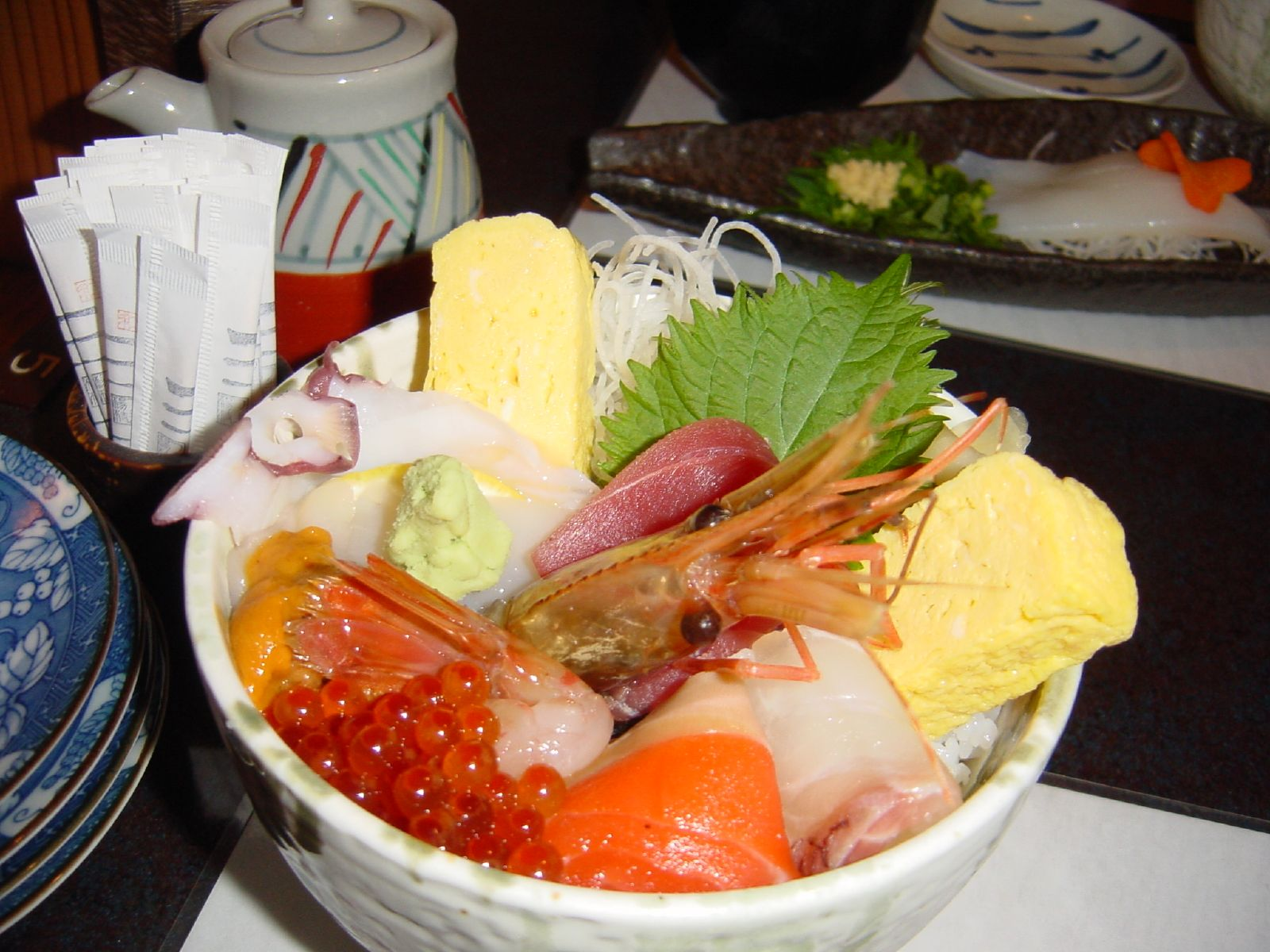 ちらし寿司(北海道小樽市色内、小樽駅最寄りの寿司屋「握 なか一」[1])